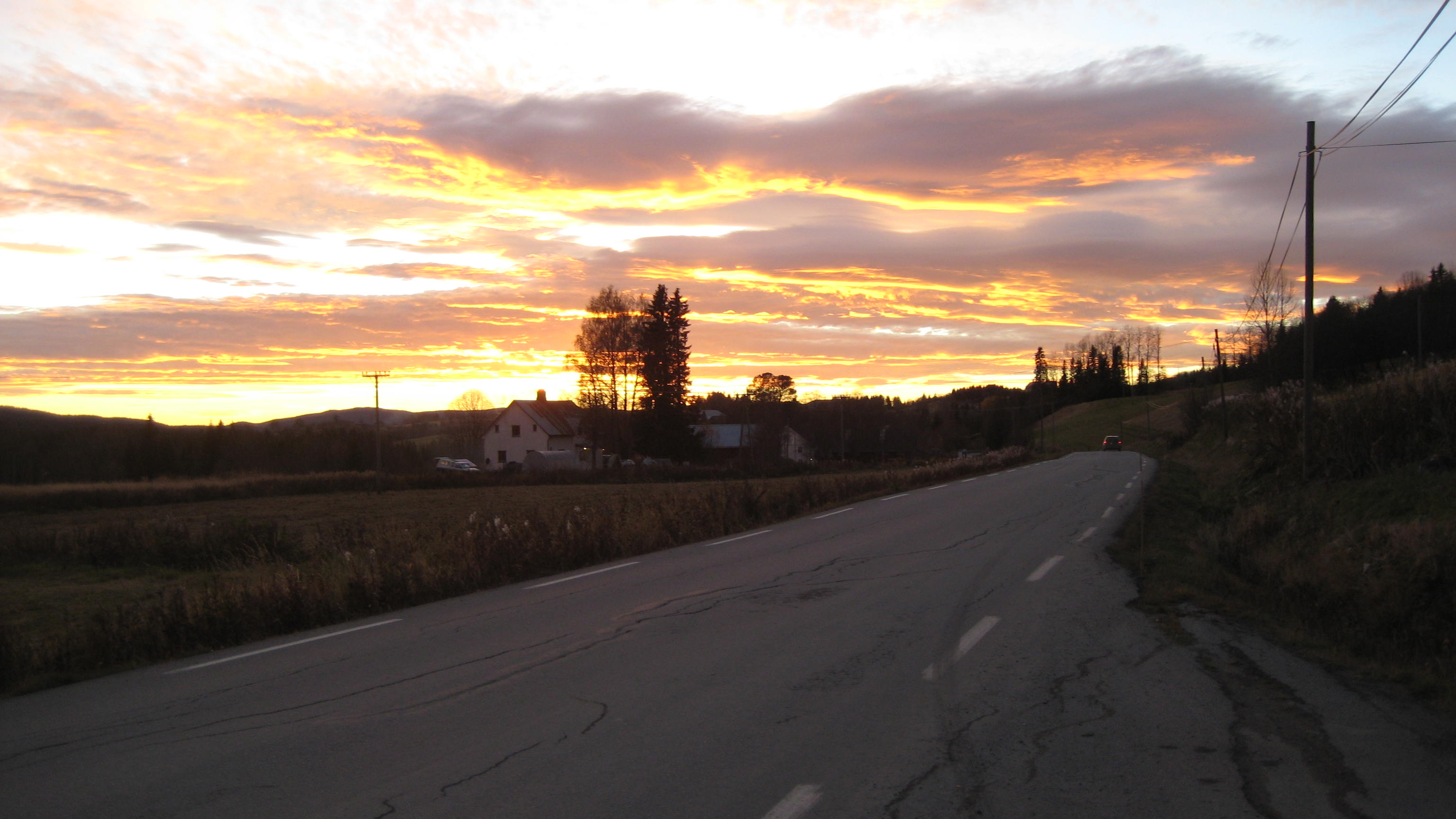 Fylkesveg 249 i Snertingdal